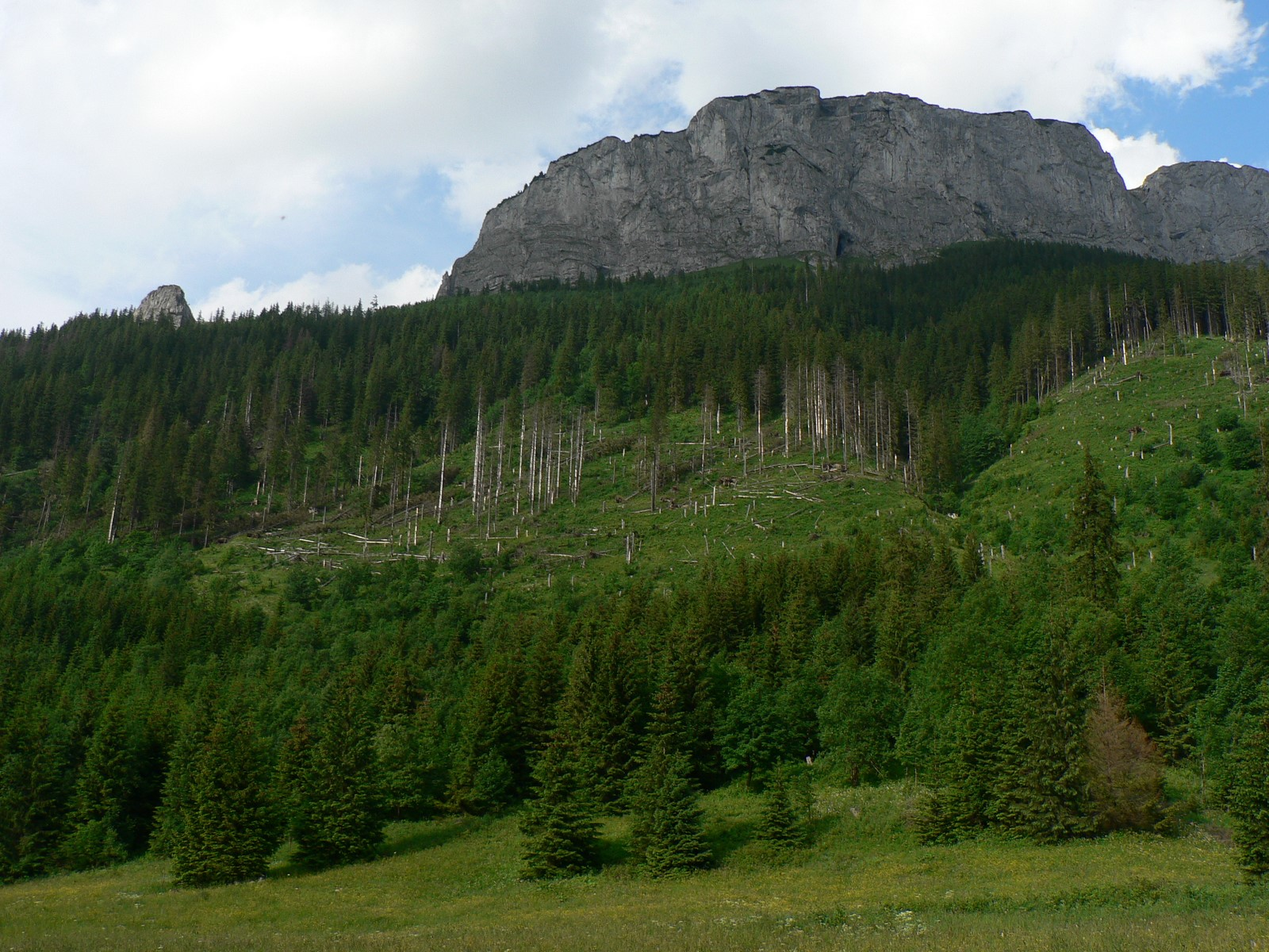 Murańska Turnia, Zadnia Murańska Przełęcz i Murań z Murańską Przehybą